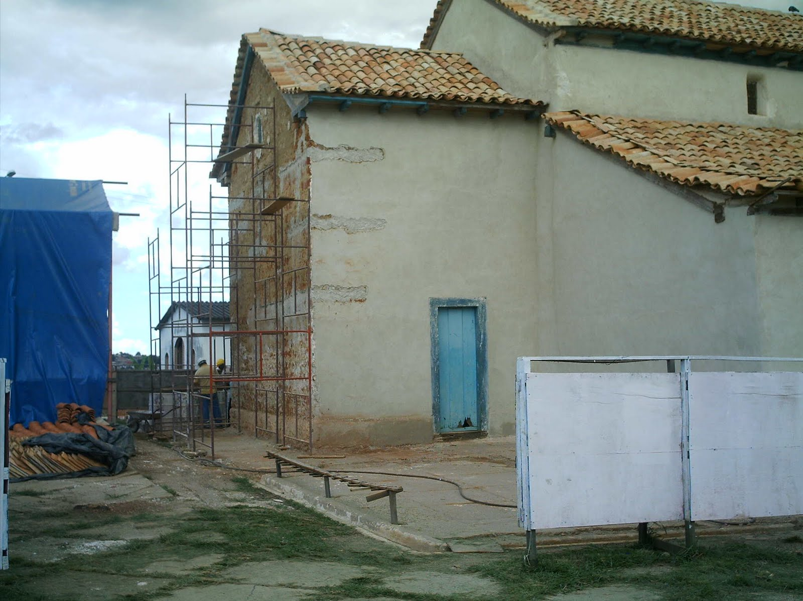 Igreja do rosário em Luziânia GO